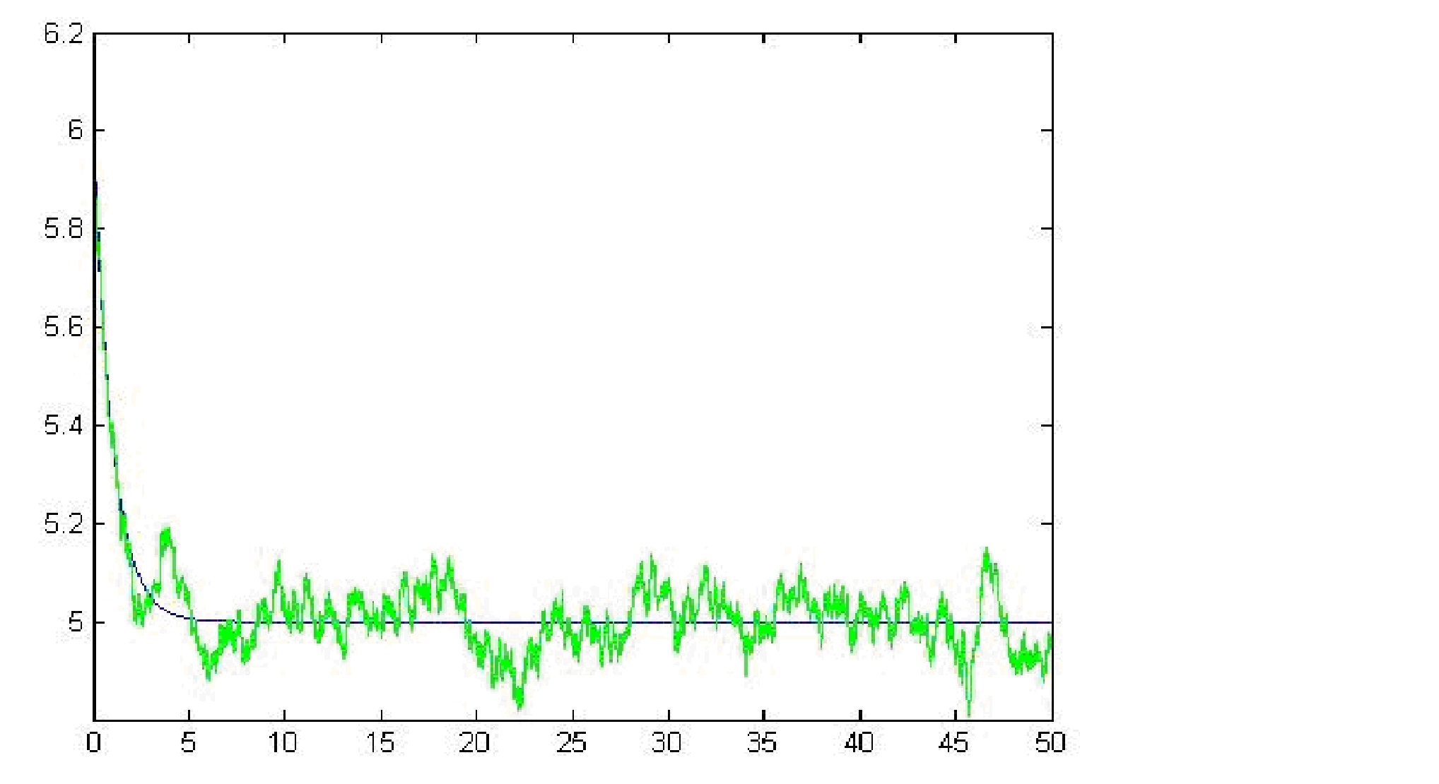 Equação diferencial estocástica para expressão genética, usando métodos numéricos e mostrando a solução determinística.